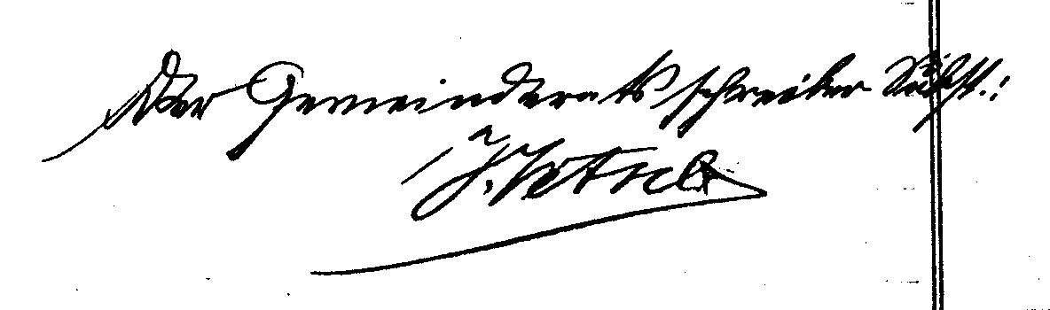 Jakob Vetsch (* 15. Mai 1886 in Grabs SG; † 5. April 1944 in Buchs SG) war Bezirksammann des ehemaligen St. Galler Bezirkes Werdenberg in der Schweiz. Dies ist seine Unterschrift als Gemeinderatsschreiber-Substitut im Rathaus der politischen Gemeinde Grabs SG, vom 4. September 1917.